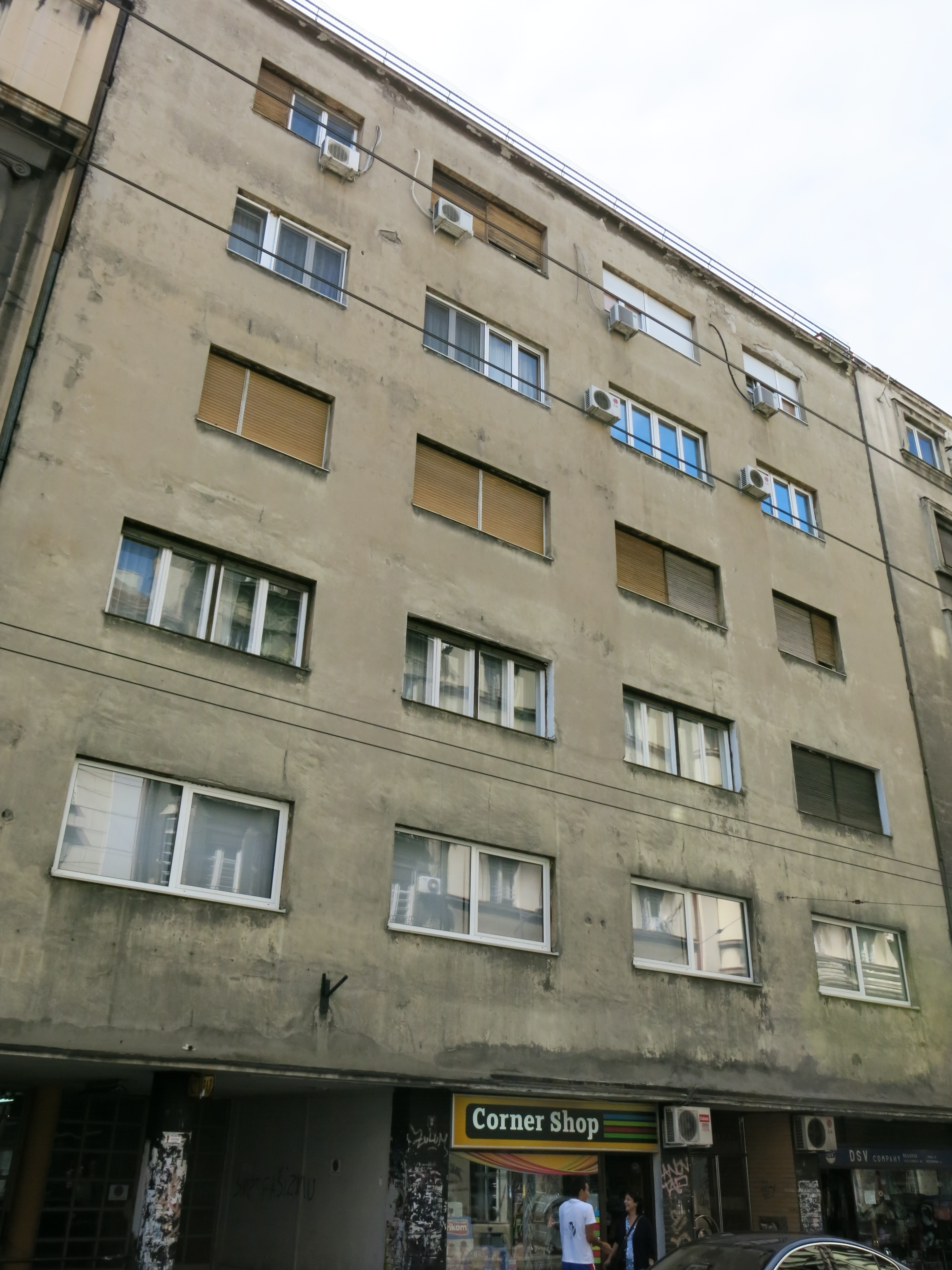 Кућа Љубомира Миладиновића